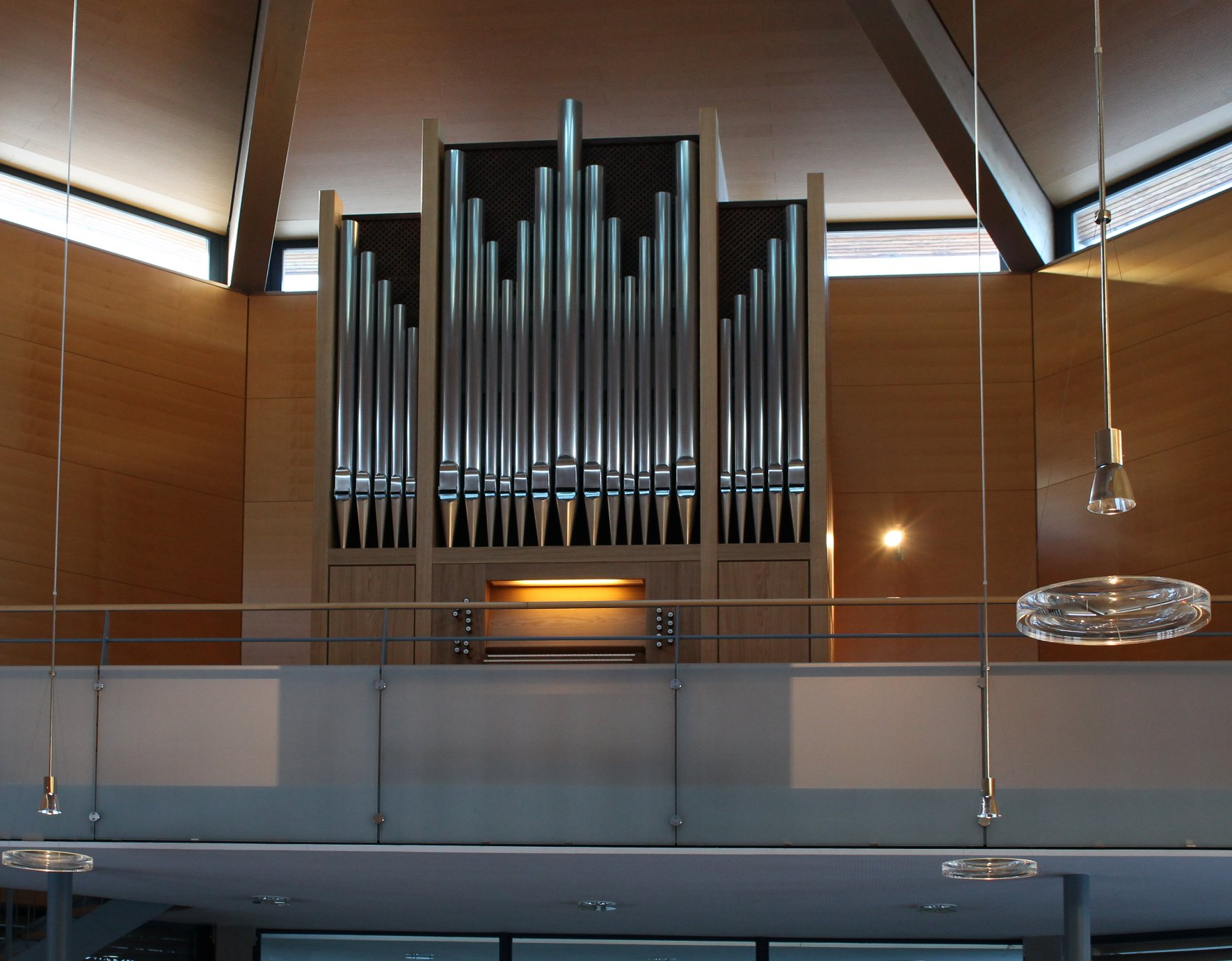 Orgel der Kreuz-Christi-Kirche in Höhenkirchen (2012, Robert Wech, II/18)